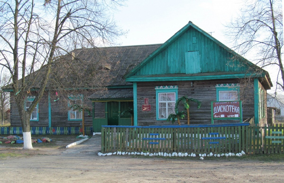 Мілашавічы. Клуб